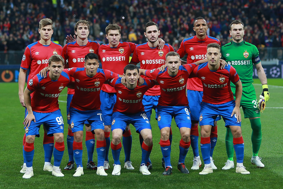 ЦСКА бьёт «Реал» при полных «Лужниках»